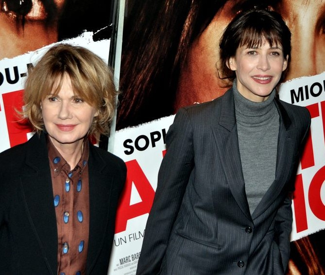 Miou-Miou et Sophie Marceau à l'avant-première du film "Arrêtez-moi"